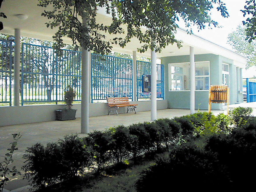 ЦЕНТРАЛНА ЕНЕРГОРЕМОНТНА БАЗА